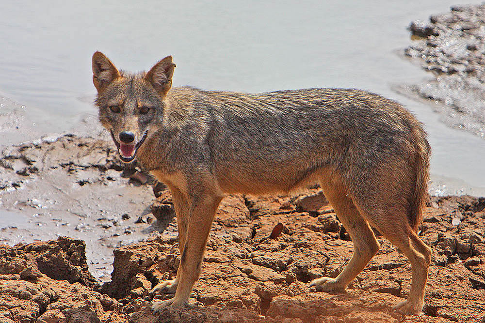 Golden Jackal